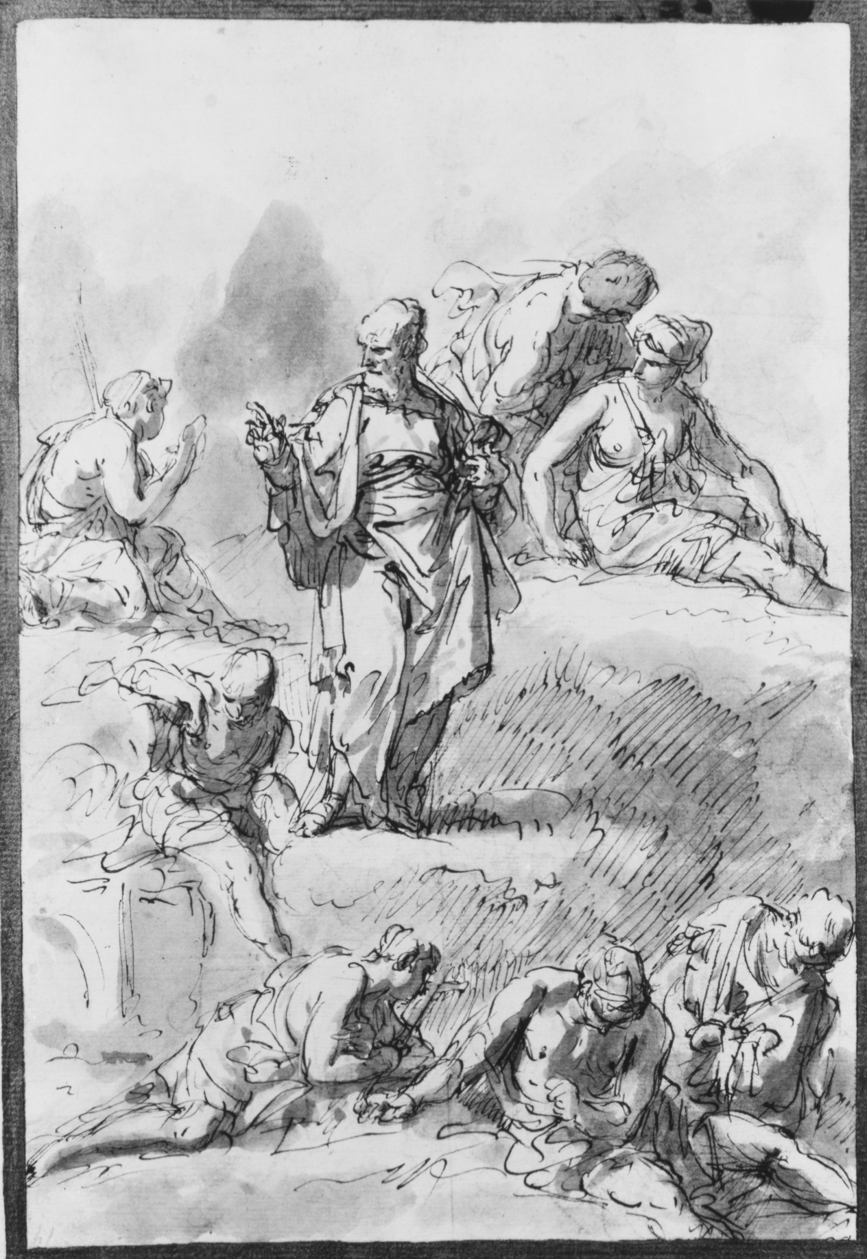 Drawing; Drawings